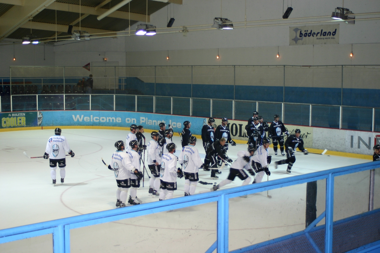 Ein selbstgeschossenes Foto vom Training in der Saison 2006/07.